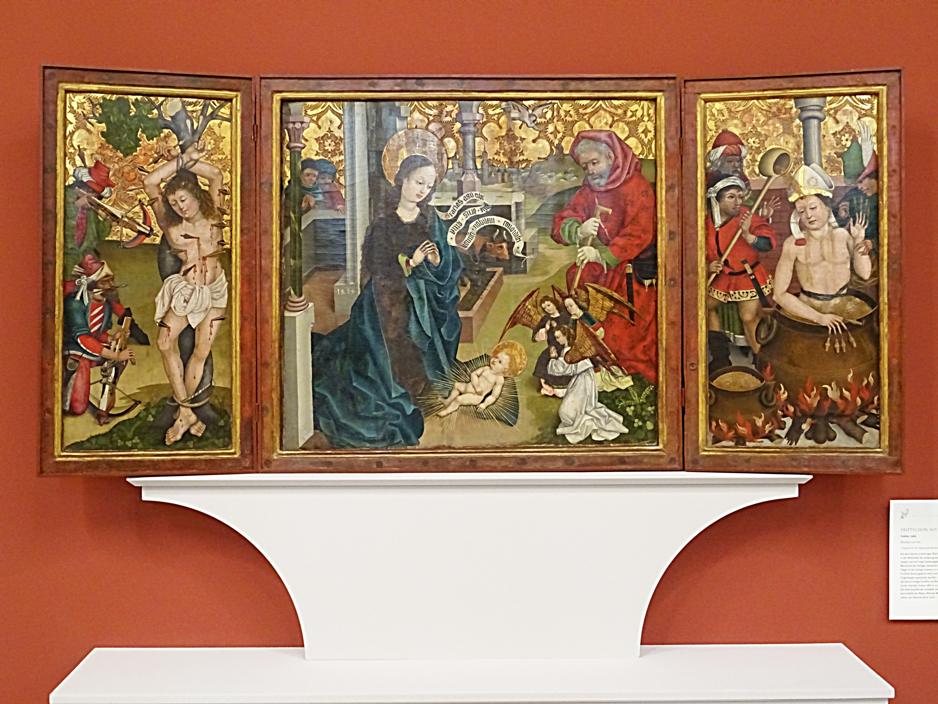 Triptychon aus der Kirche Breitenheerda (1484). In der Mitte die Anbetung des Christuskindes durch Maria, Joseph und drei Engel. Links das Martyrium des Hl. Sebastian, rechts das Martyrium des Hl. Erasmus. Die hohe Qualität verweist auf einen fränkischen Künstler aus dem Umfeld des Malers Michael Wolgemut (1434–1519), dem Lehrer von Albrecht Dürer. Der Altar ist im Besitz der Klassik Stiftung Weimar und zur Zeit in der Marienkirche (Mühlhausen) zu sehen.[1]